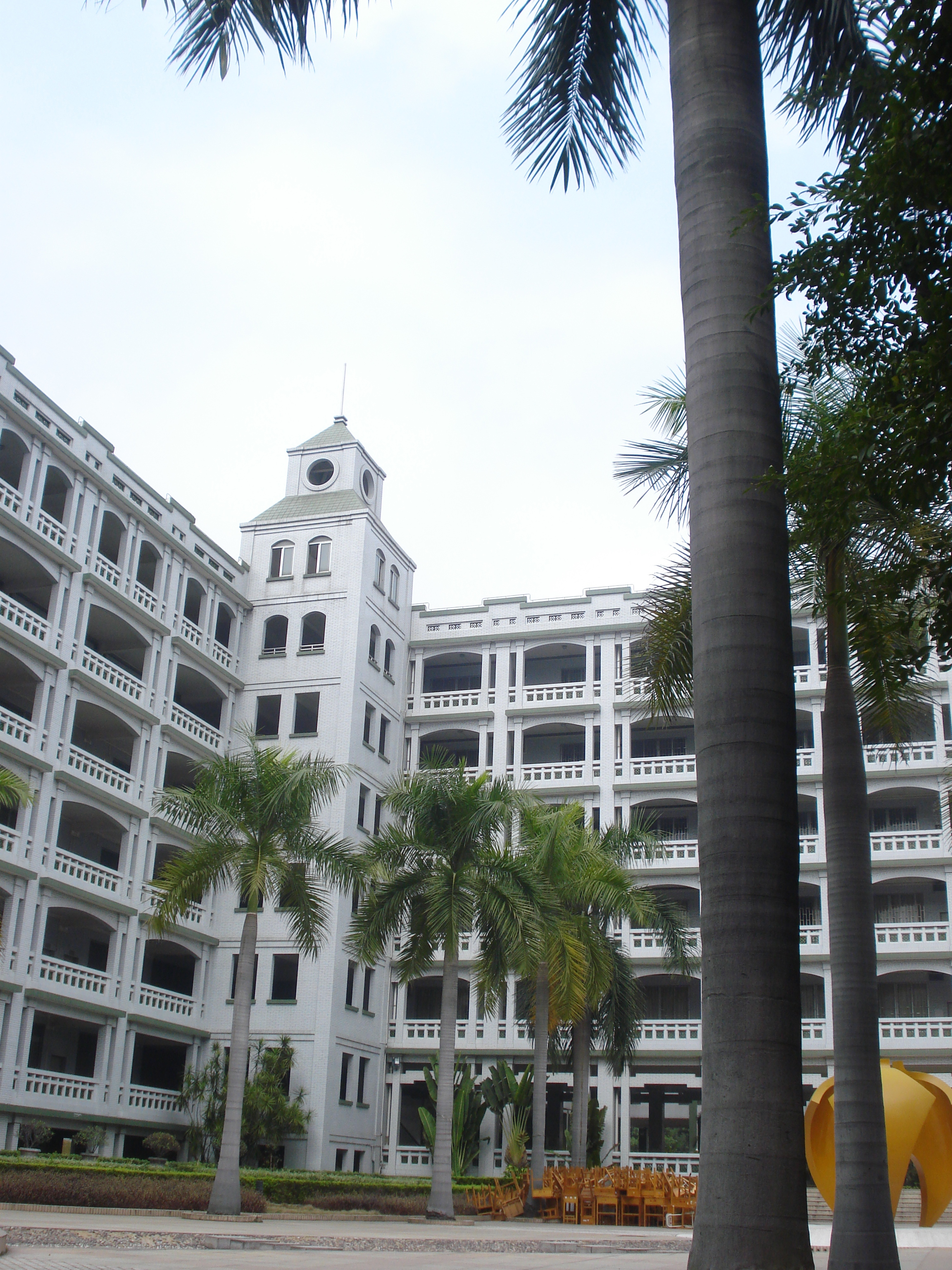 佛山一中东区教学楼